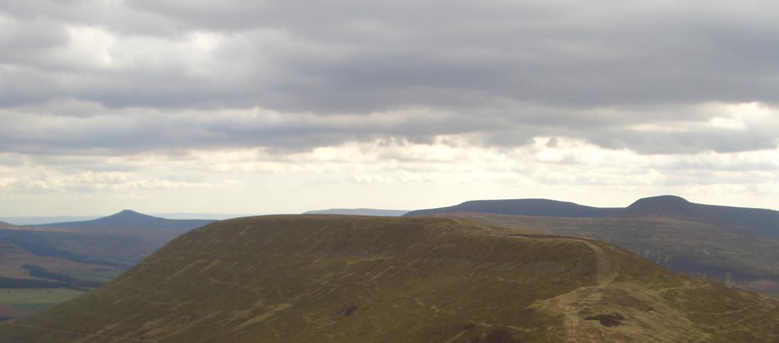 mynydd llysiau